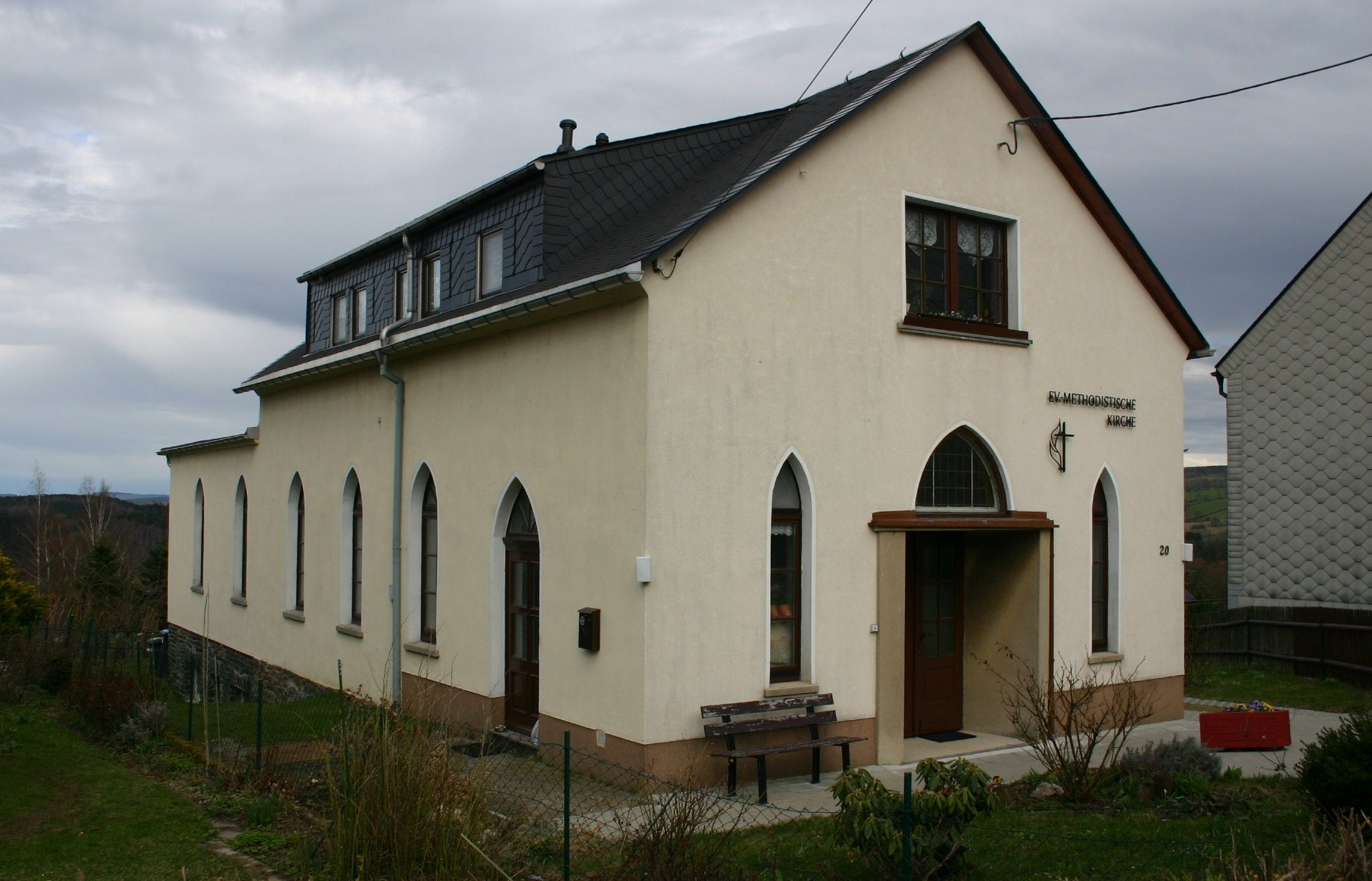 Das Kirchengebäude der Evangelisch-methodistischen Kirchgemeinde Witzschdorf von Westen gesehen